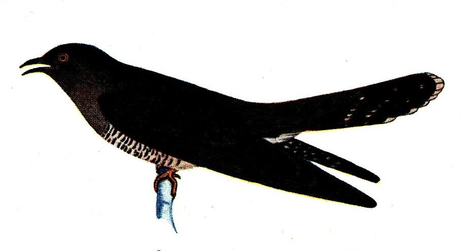 Cuculus canorus